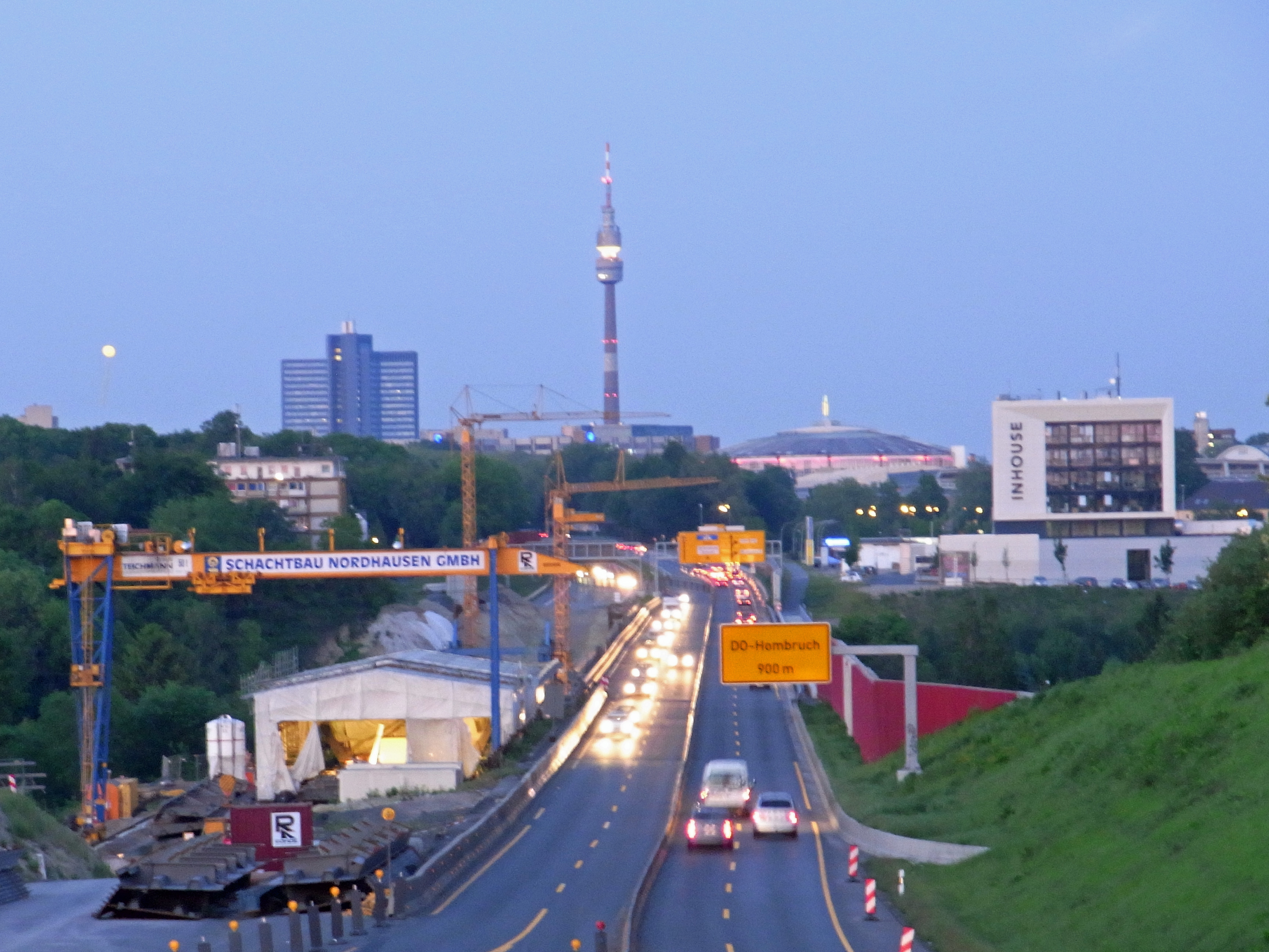 Nacht-SchachtZeichen Blick über den Neubau der Schnettkerbrücke zu Ballon der Zeche Friedrich Wilhelm